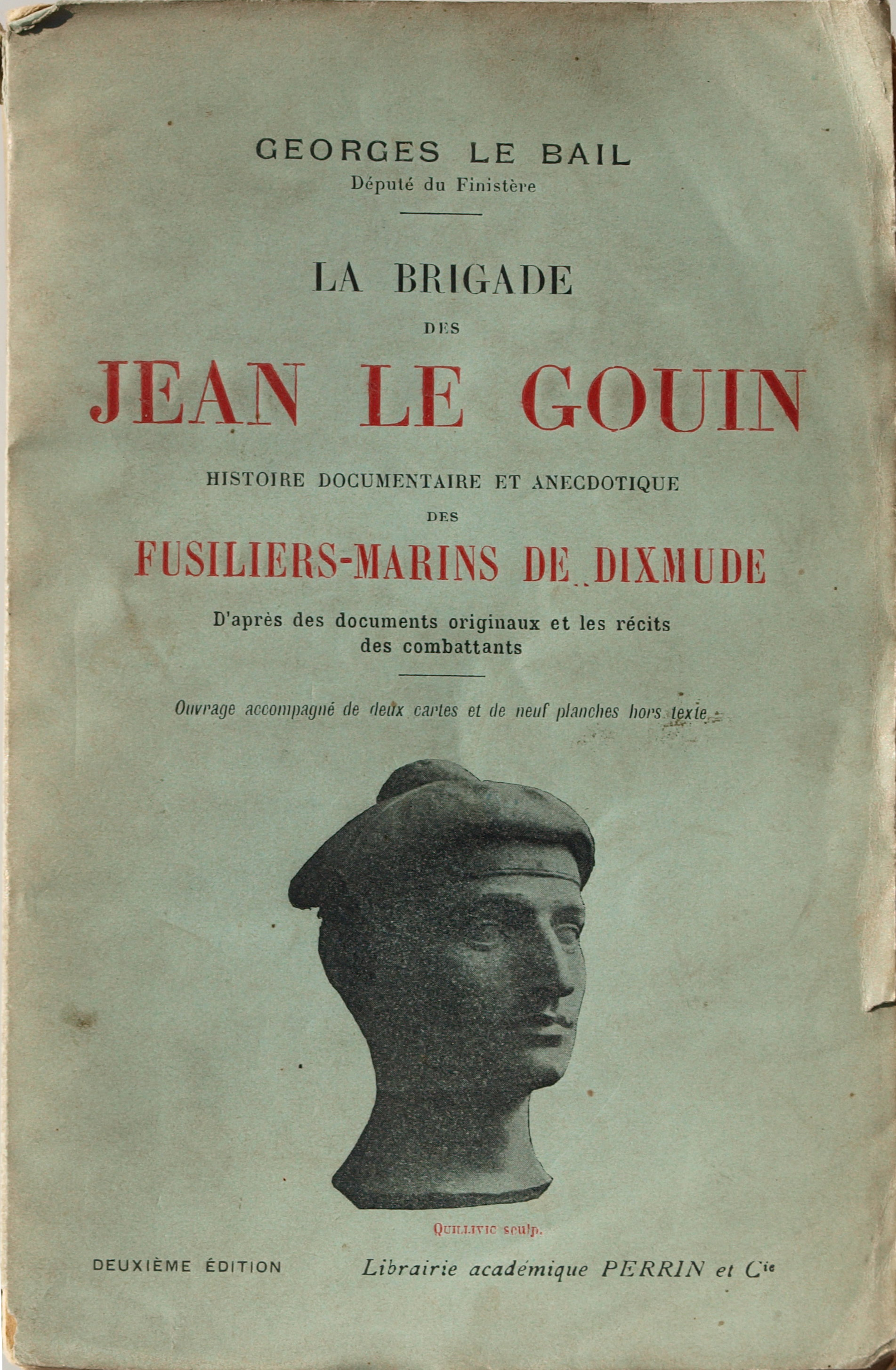 Nieuport durant les combats de la première guerre mondiale